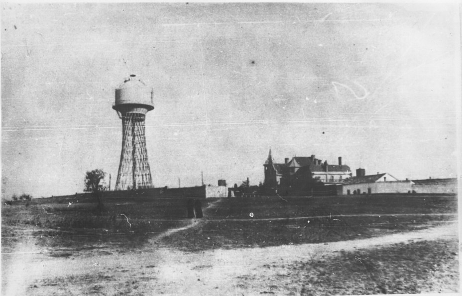 Будинок керівника завода "Наваль" Іоакима Самуїловича Каннегісера